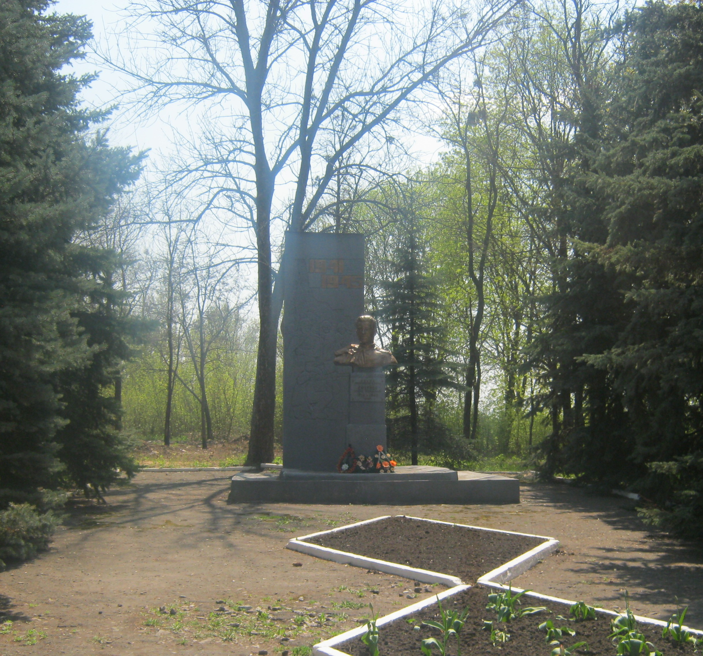 Пам'ятник І. Т. Доценко – Герою Радянського Союзу., Липкуватівка